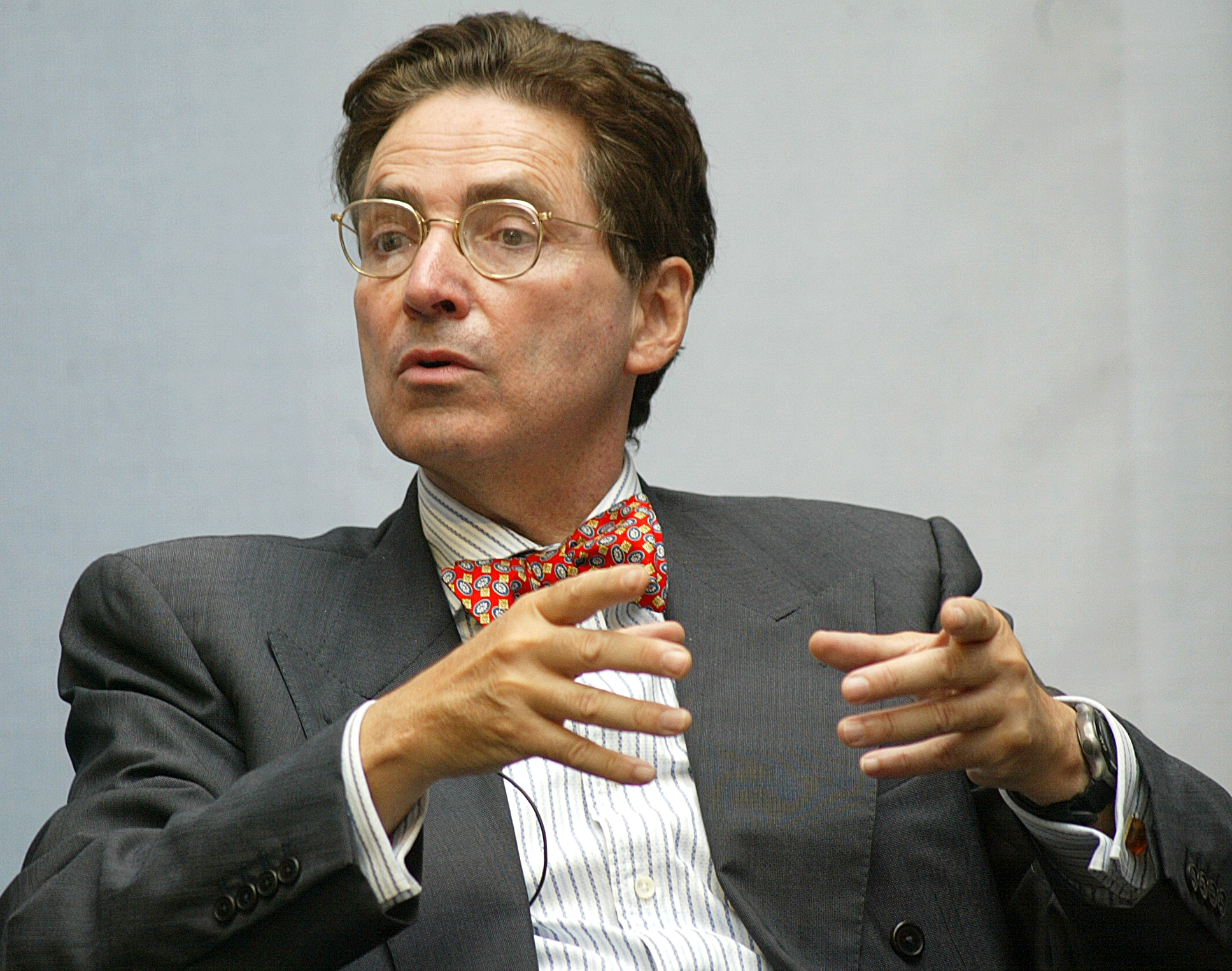 Prof. Dr. Dr. Alfred de Zayas Datum: 07/2005 Urheber: Foto wurde durch einen Freund von Prof. Alfred de Zayas erstellt (reines Gefälligkeitsfoto zu Gunsten von Prof. Alfred de Zayas; alle Bildrechte liegen bei Herrn Prof. Alfred de Zayas) Quelle: privates Fotoarchiv von Prof. Alfred de Zayas